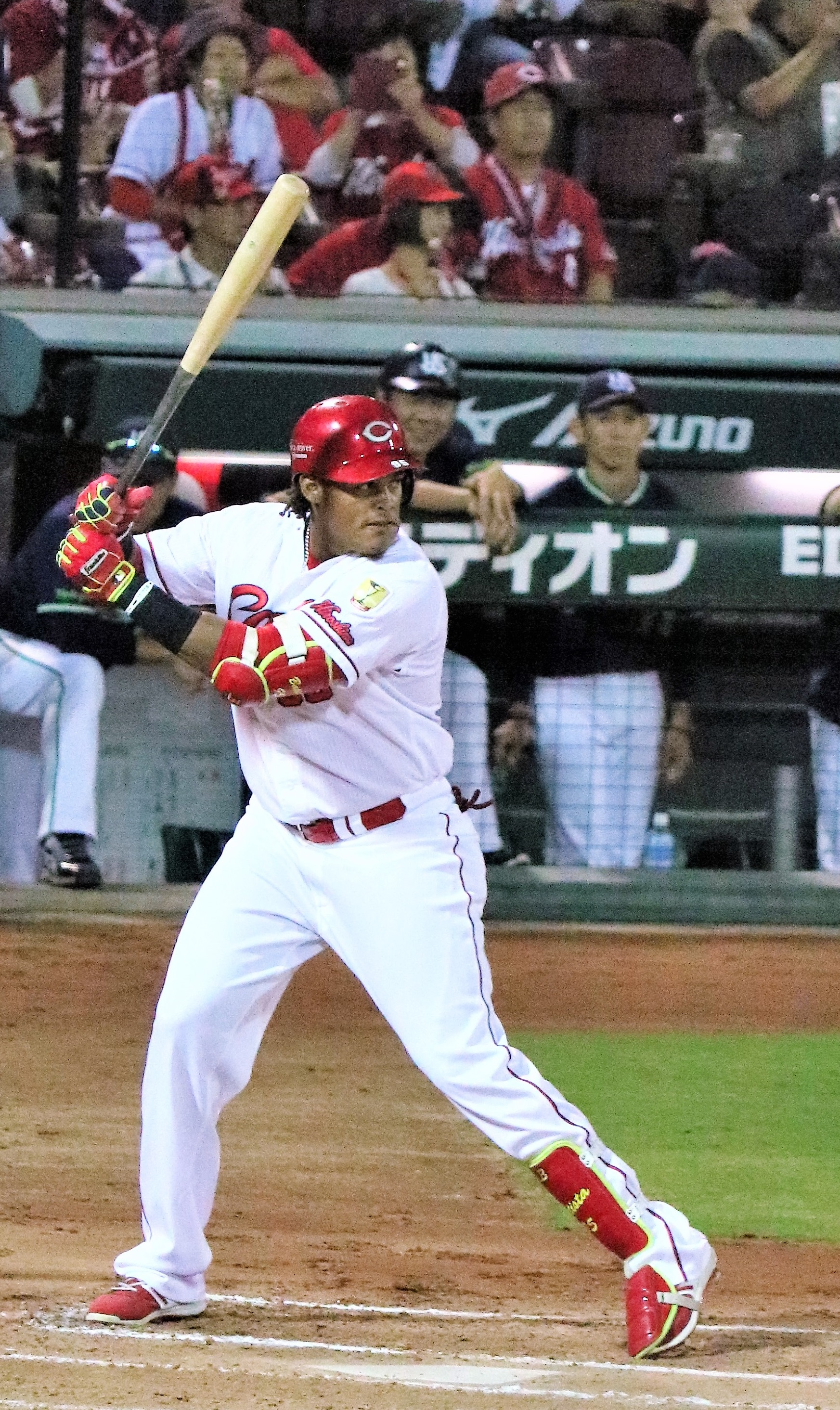 打撃フォーム(2017/9/28マツダスタジアム)